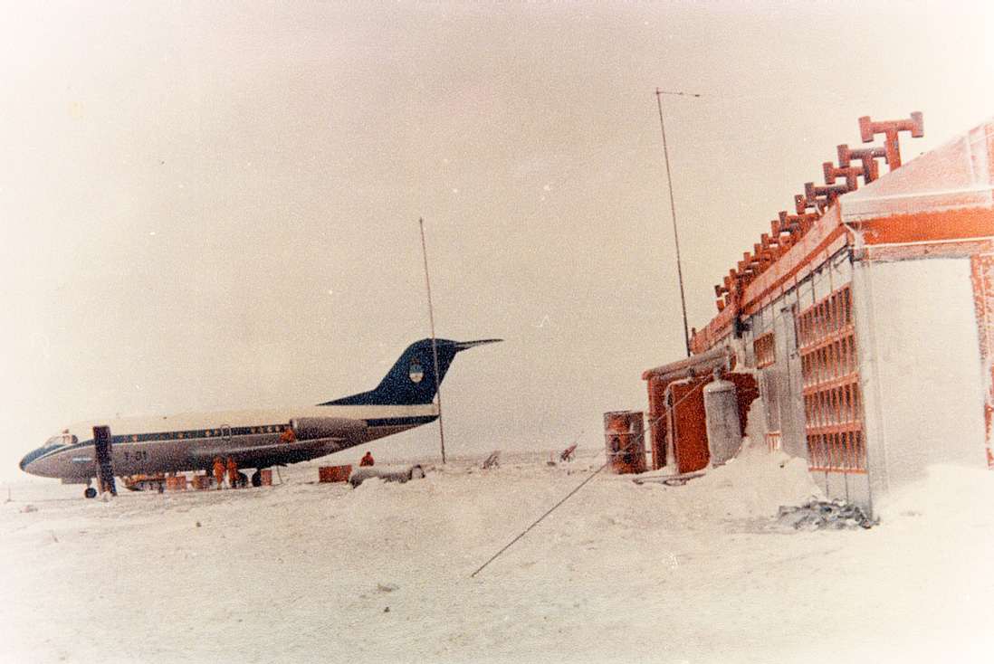 El 28 de julio de 1973, el avión presidencial Matrícula T-01 "Patagonia", un reactor Fokker F-28 Fellowship, aterrizó en la pista de la Base Aérea "Vicecomodoro Marambio" de la Antártida Argentina. El vuelo se planeó para asegurar la operación que luego se realizó el día 10 de agosto del mismo año, para trasladar al Presidente Provisional Raúl Lastiri y miembros de su gabinete.